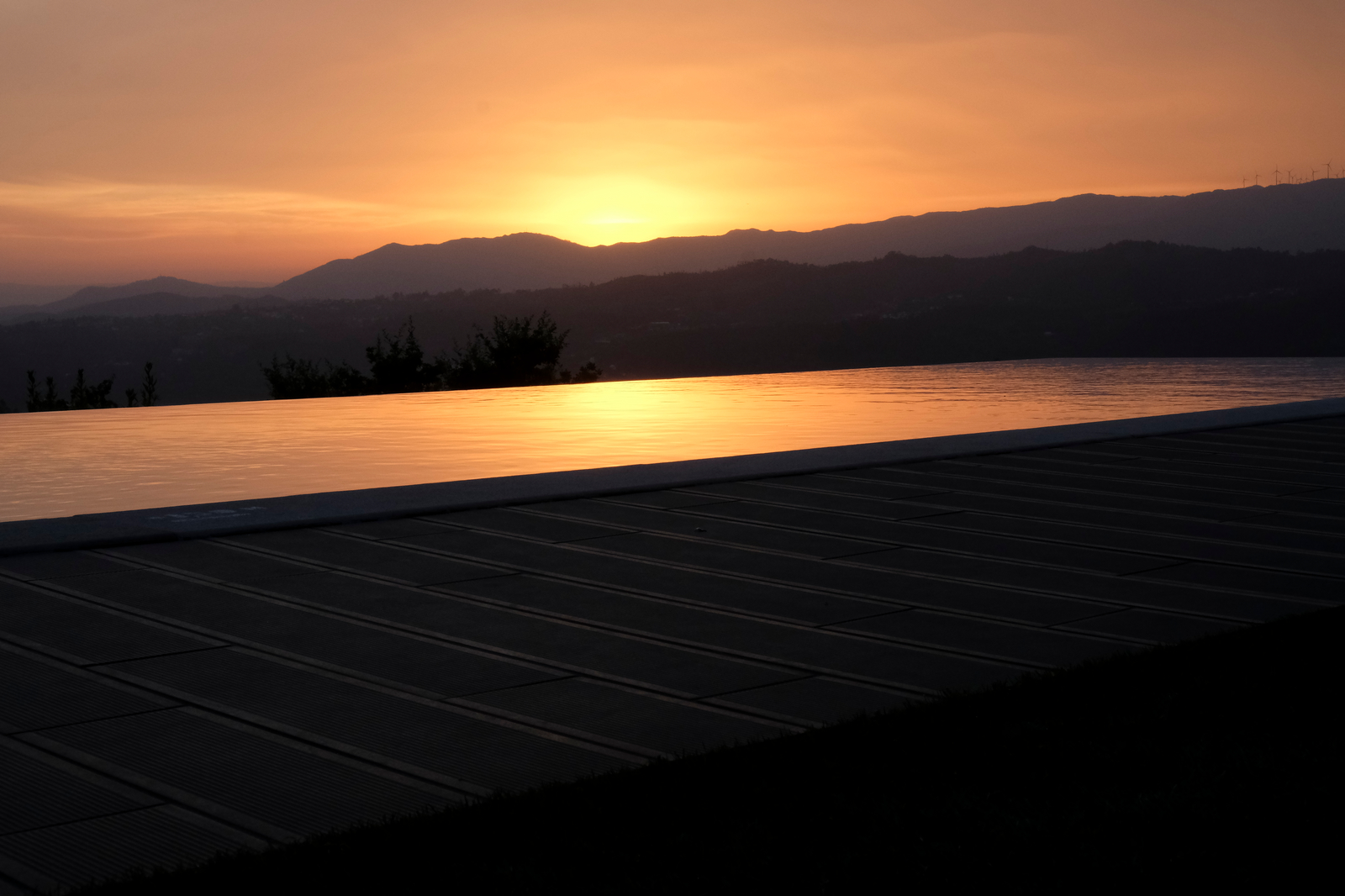 Serras da Freita e Arada. Quando estamos em Figueiredo das Donas, no Paço da Torre, o Sol põe-se por trás da Serra da Arada. O contra-luz em conjunto com o reflexo na água de uma piscina, realçam a silhueta da serra. This is a photography of a protected area of Portugal indexed in the World Database on Protected Areas with the ID: 555531116 (WDPA)